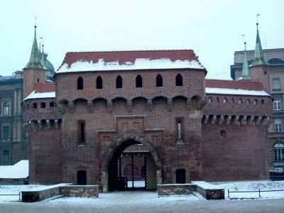 Krakowski Barbakan zimą